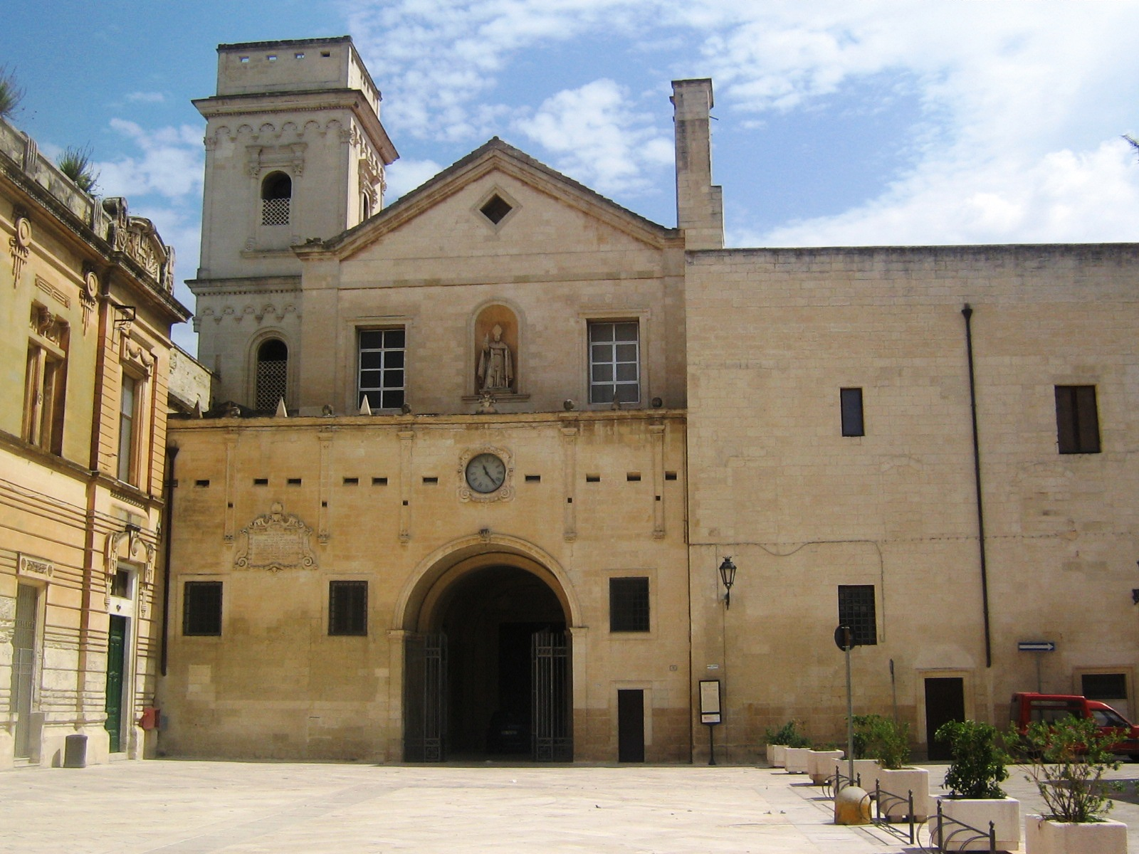 Lecce Chiesa San Giovanni Evangelista